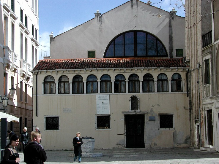 Chiesa di S.Samuele La foto è stata scattata il 24 marzo 2002 a Venezia (Italia) Categoria:Immagini di Venezia Categoria:Immagini di chiese cattoliche